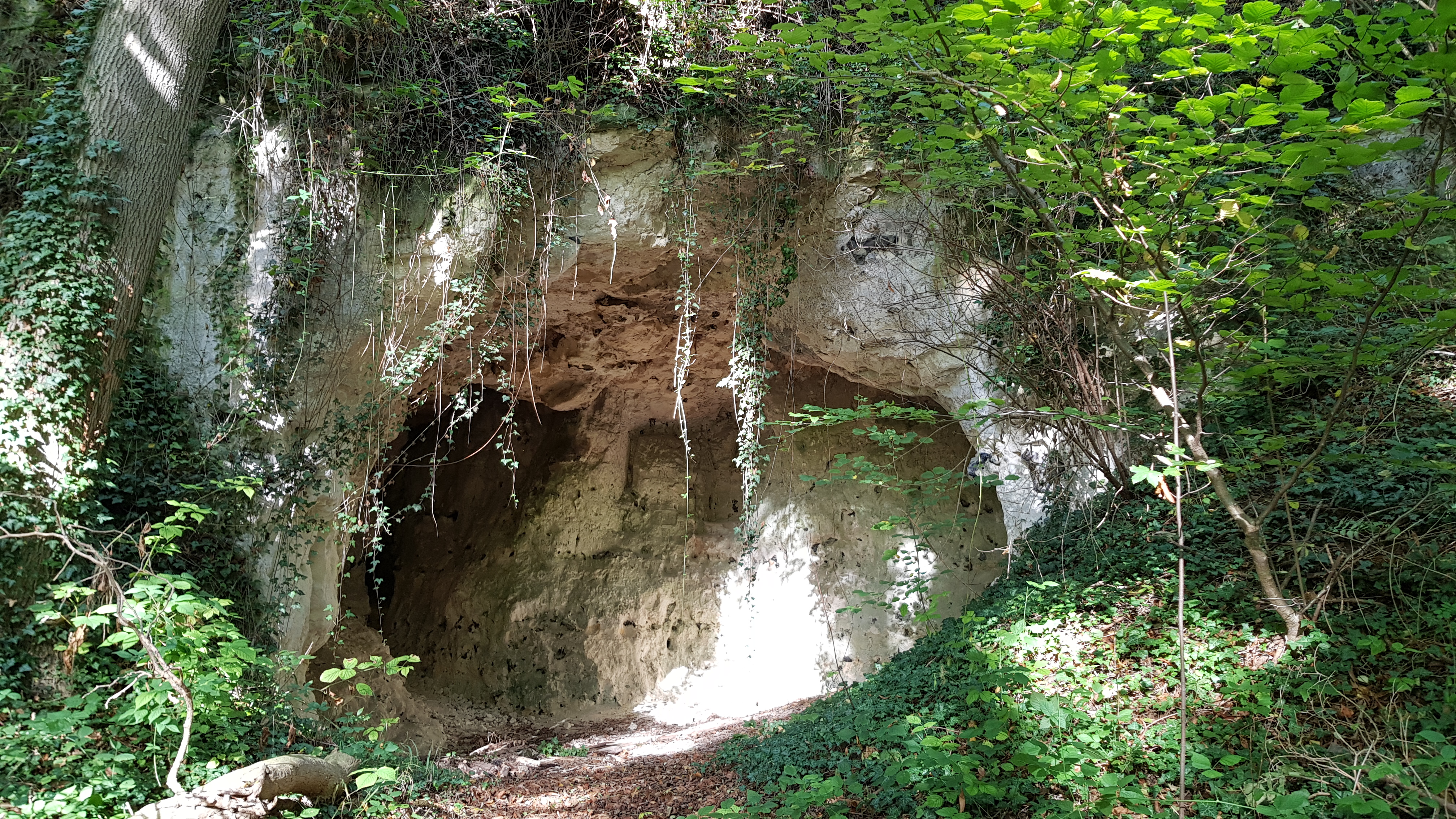 Abri van Rijckholt in Savelsbos, Rijckholt, Nederland